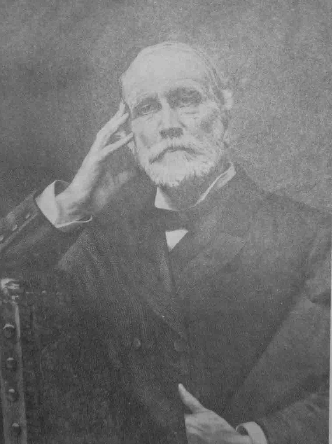 Portrait de Henri Germain - 1824 - 1905